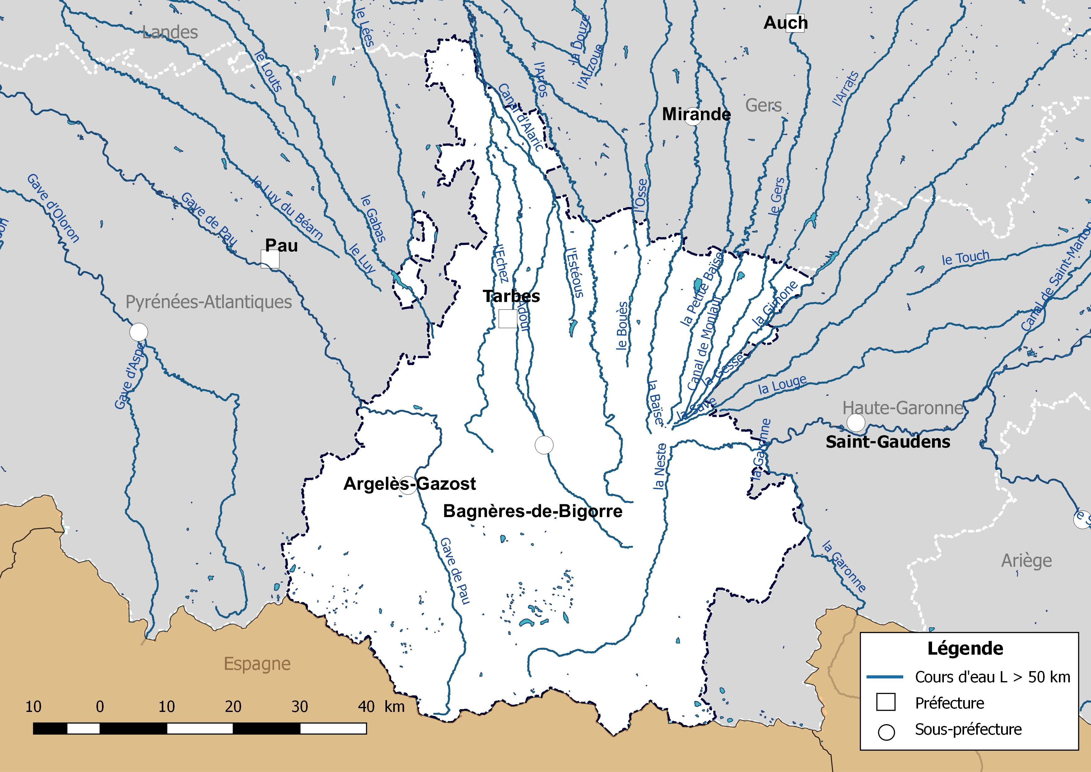 Carte des cours d'eau de longueur supérieure à 50 km drainant le département des Hautes-Pyrénées (France).